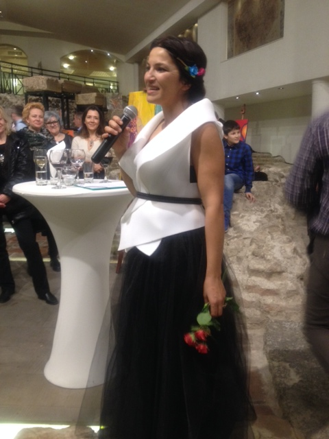 Гроника Кавафян - художник